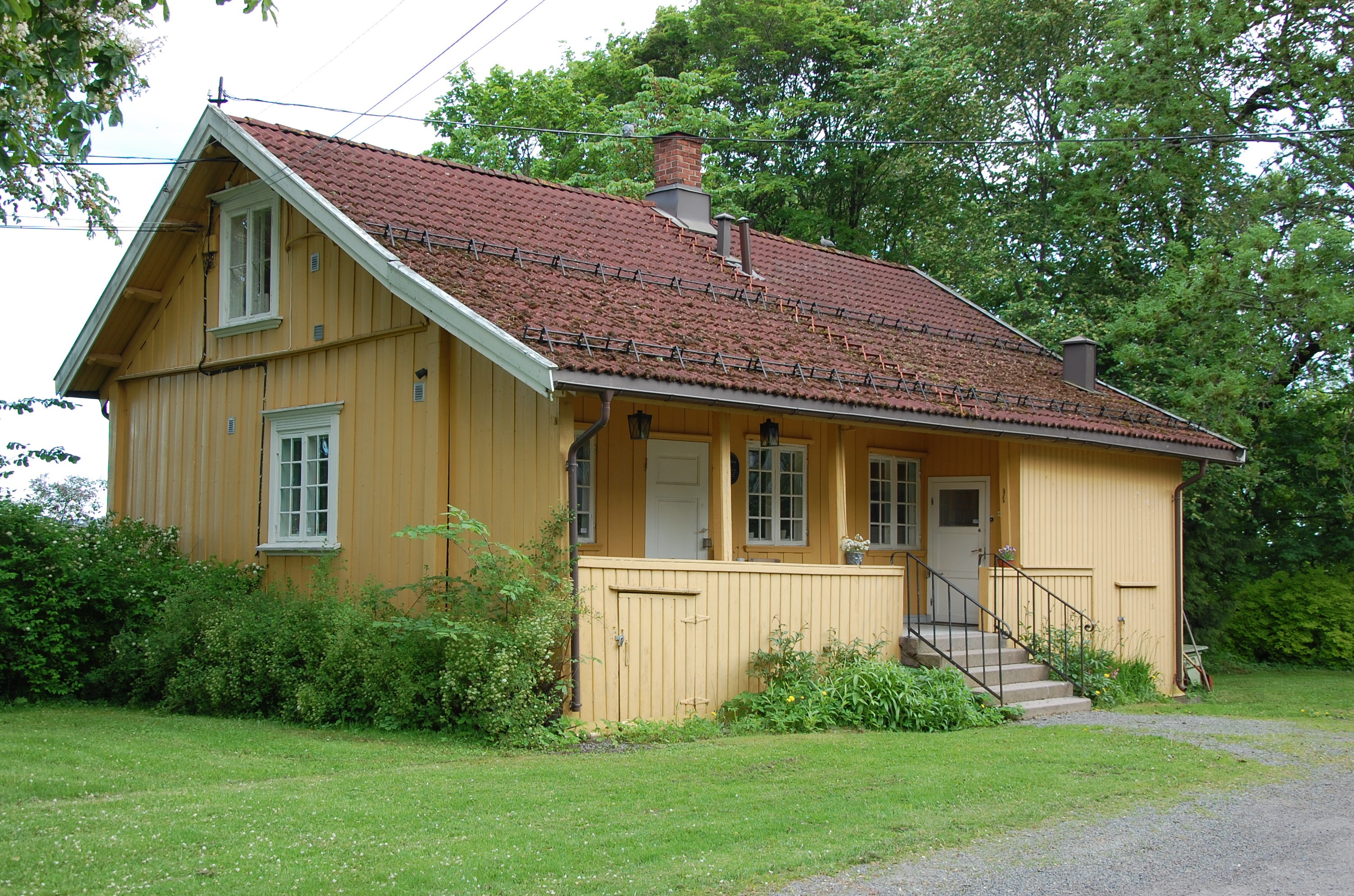 Bakkehaugen gård i Oslo, gårdstun med 6 bygninger med Haugestua. Einar Høigårds vei 25. Tilhørte en periode Hans Nielsen Hauge, som bodde i Haugestua. Senere tilhørt hans bror Michel Nielsen. Overtatt av Carl Grøndahl, som fikk bygget det nye hovedhuset ved arkitekt Einar Smith i 1909.